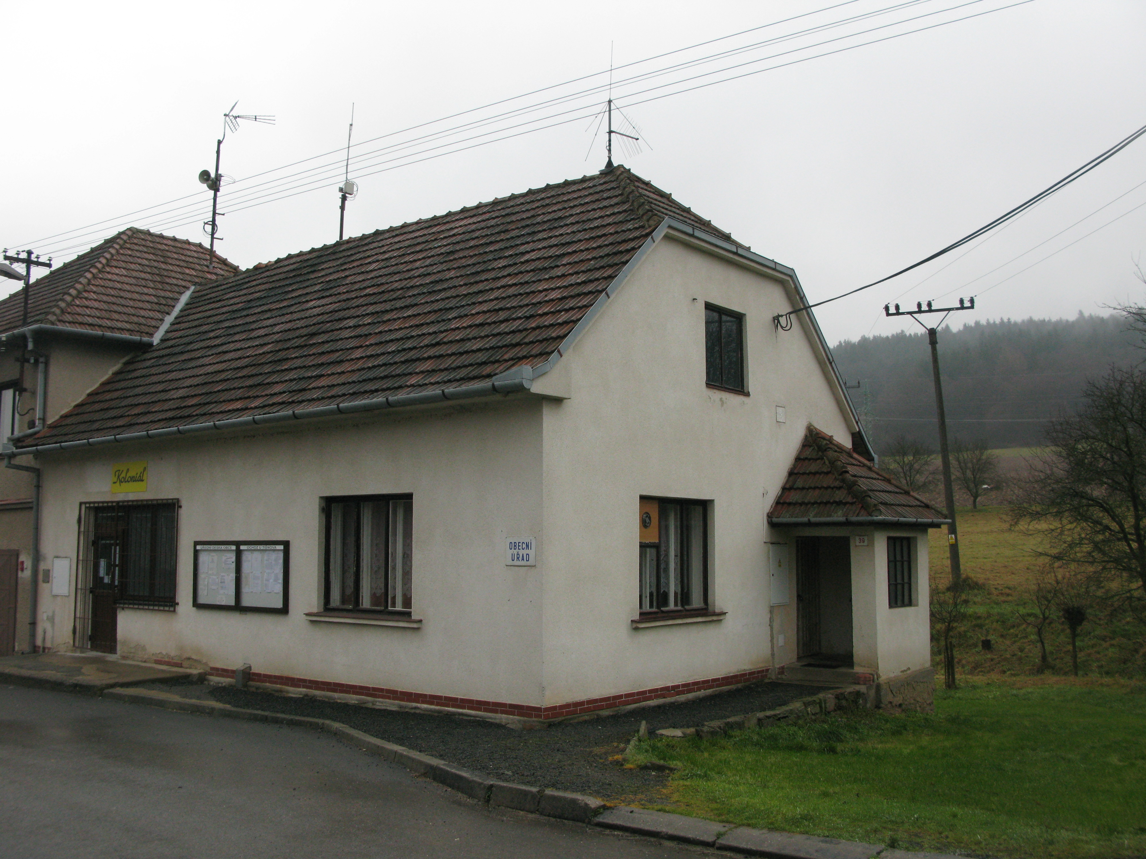 Pohled na sdílený dům obecního úřadu a samoobsluhy